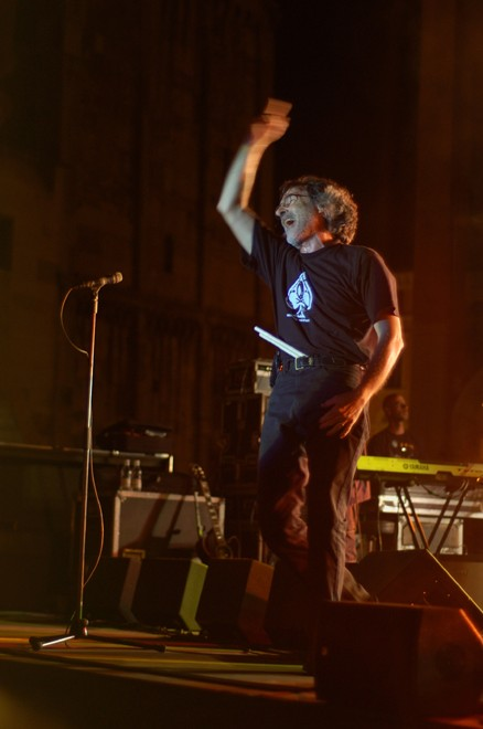 Franz Di Cioccio con la PFM a Modena.